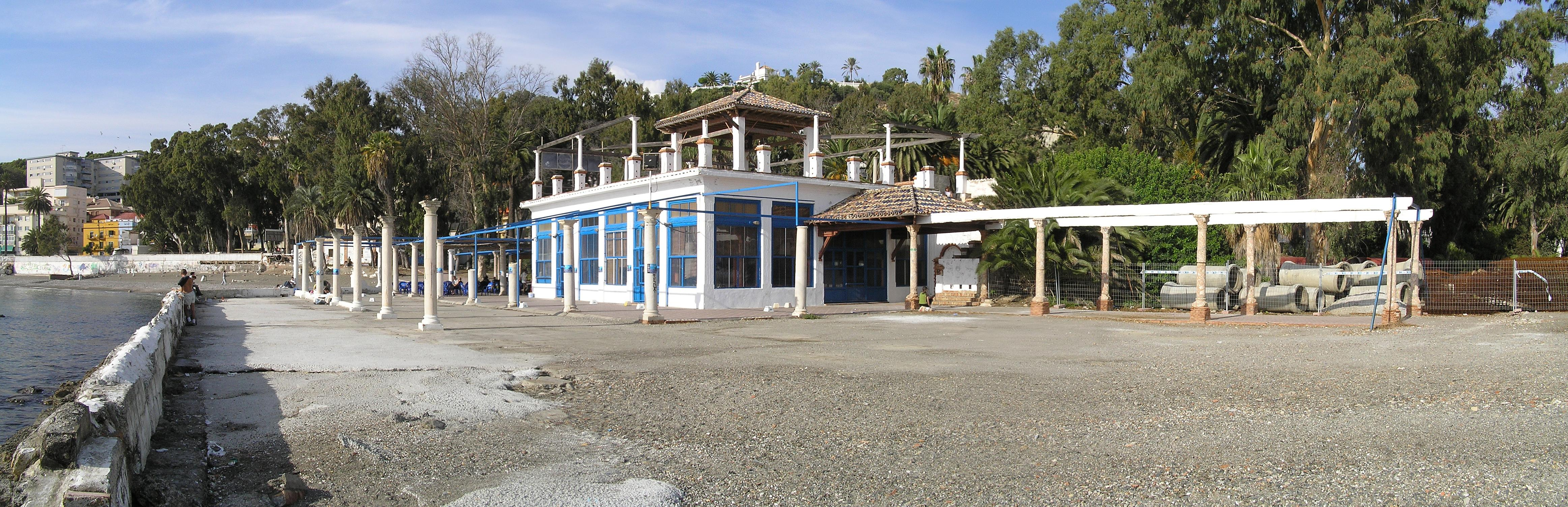 Baños del Carmen (Málaga) Edificio principal de los Baños del Carmen (Málaga)